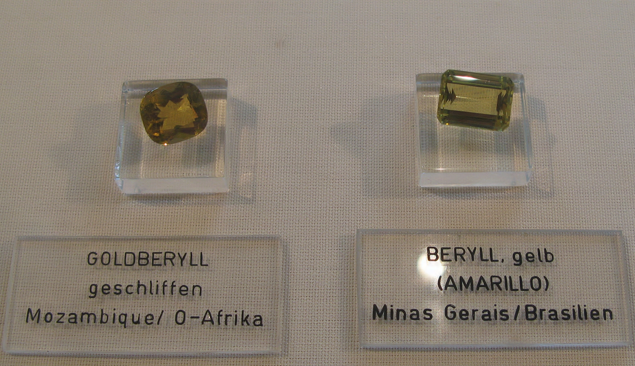 Goldberyll (Heliodor) im Ceylon-Schliff (Fundort: Mosambik) und gelber Beryll (Amarillo) im Treppenschliff (Fundort: Minas Gerais, Brasilien) - Ausgestellt im Mineralogischen Museum Bonn